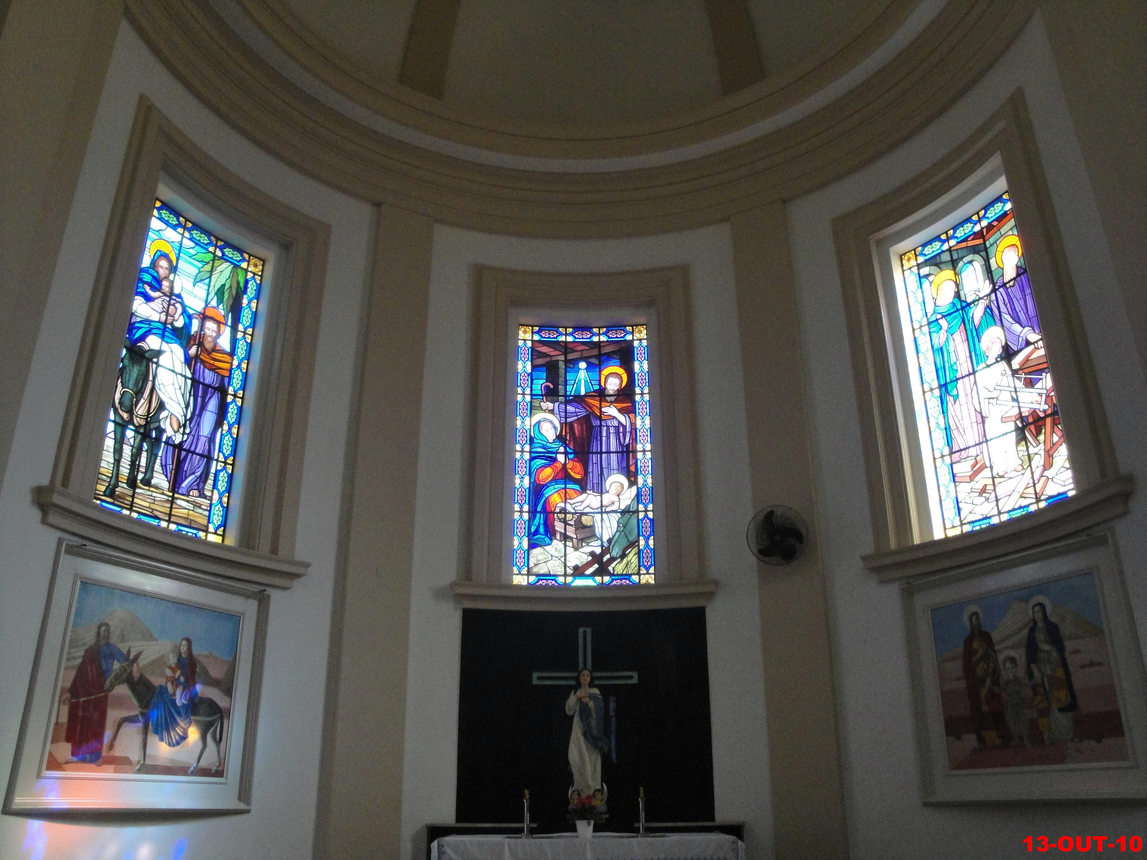 Igreja Matriz do Bom Jesus da Cana Verde em Batatais. Os vitrais da Igreja são de autoria de Conrado Sorgenicht Filho e as pinturas são de autoria de Cândido Portinari e foram pintadas entre 1950 e 1952. Em 2014 foi concluído o trabalho de restauração das telas sacras de Cândido Portinari.